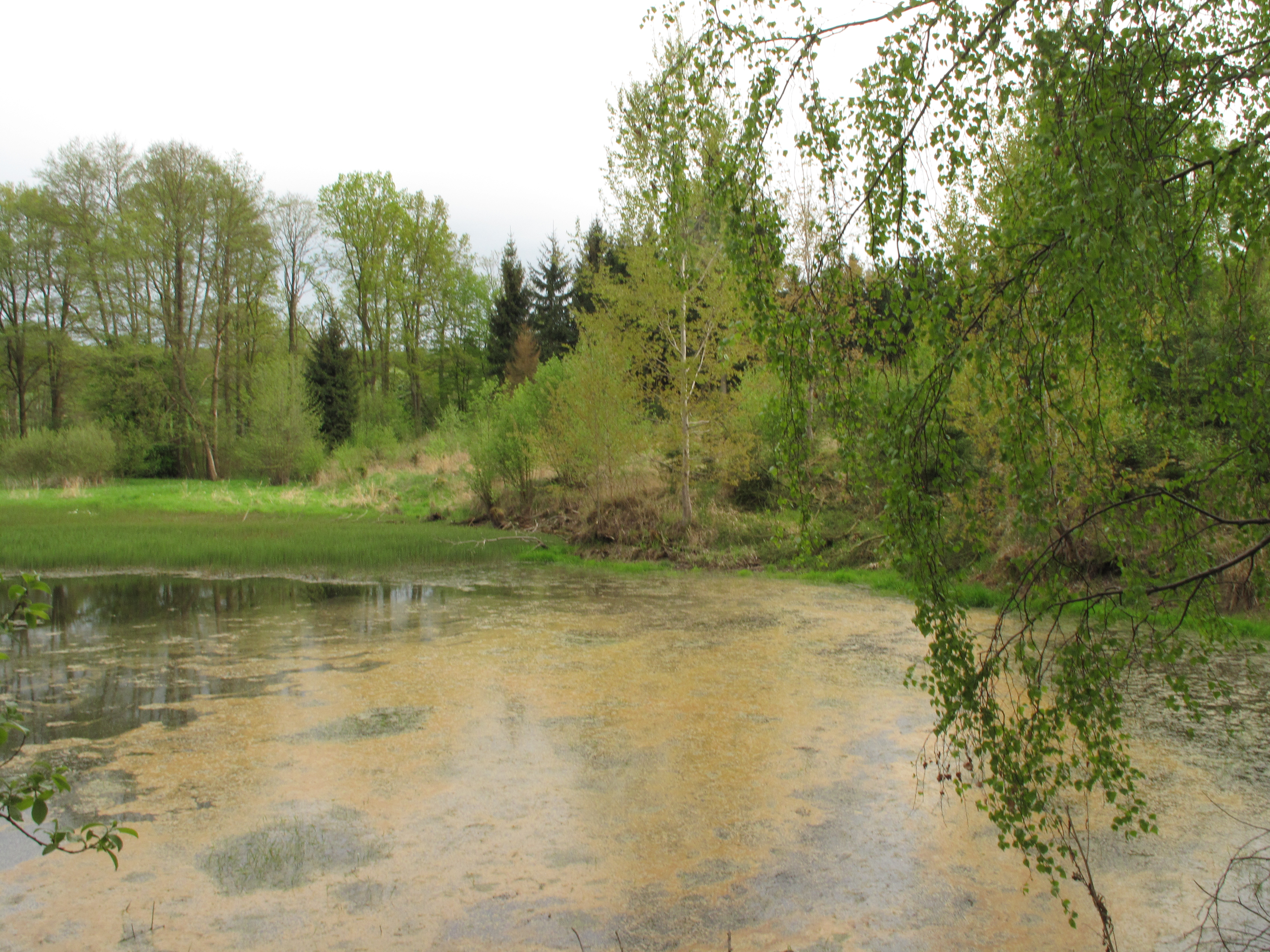 Přírodní památka Částrovické rybníky. Okres Benešov, Česká republika.